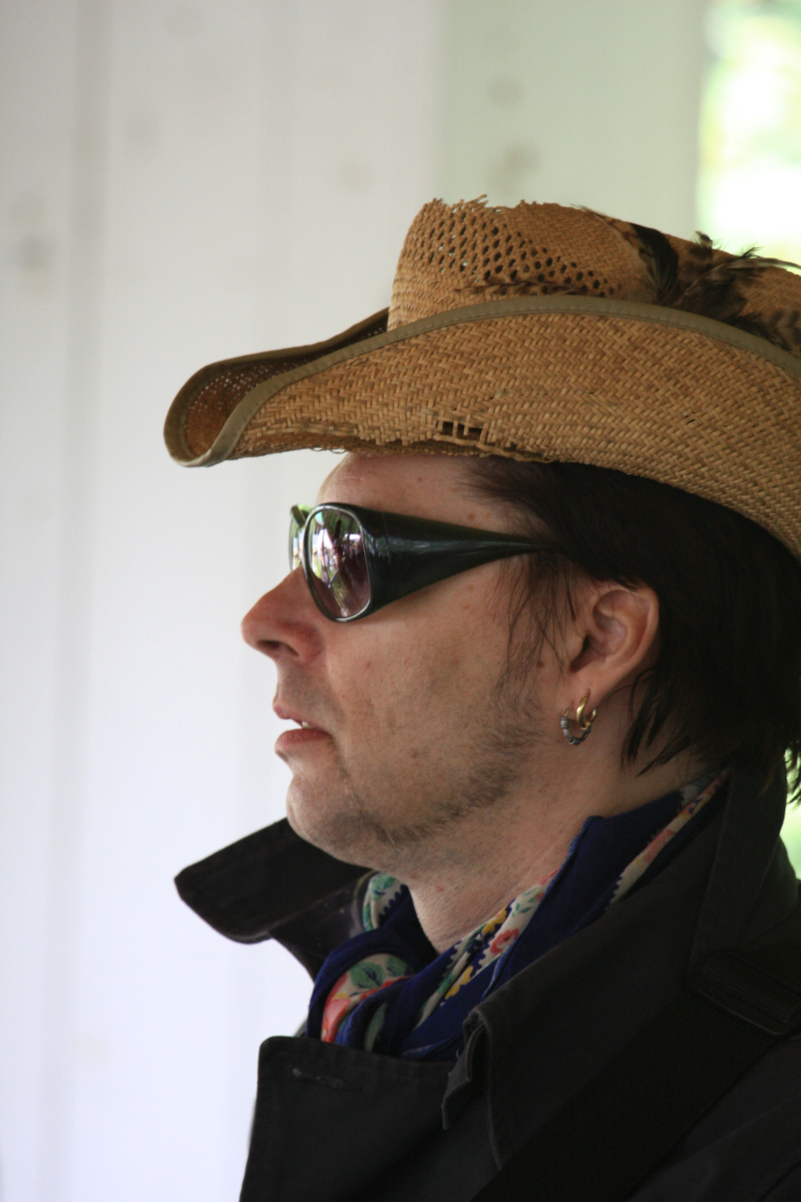 Esa Kuloniemi suomalainen kitaristi Honey B and the T-Bones yhtyeestä